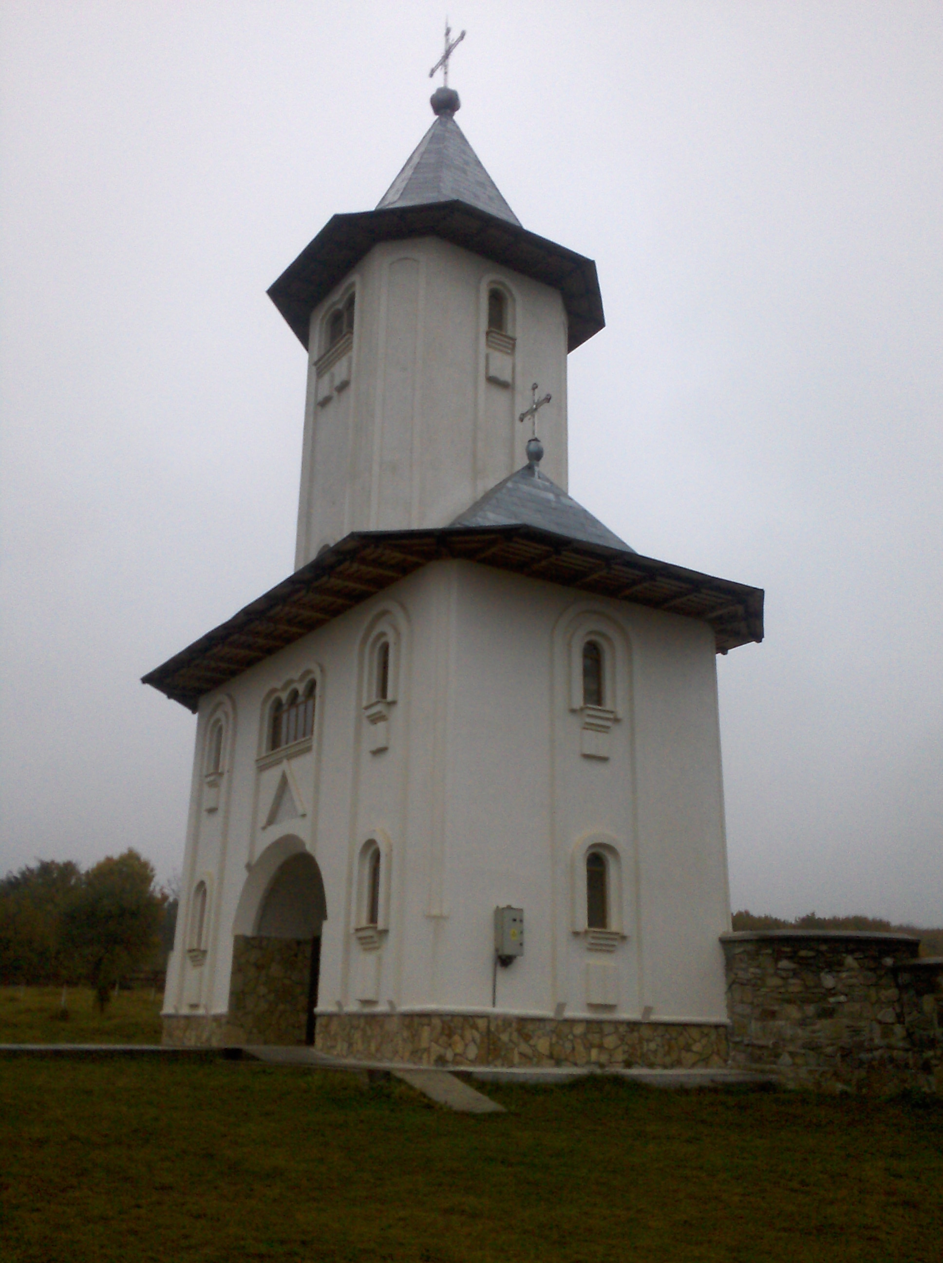 torre con campanar, Gorovei, distrito de Botoşani, Rumania